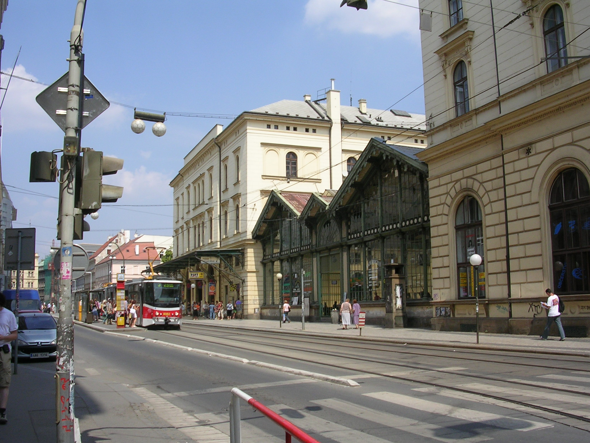 Masarykovo nádraží, průčelí v Havlíčkově ulici v pohledu od Hybernské ulice.